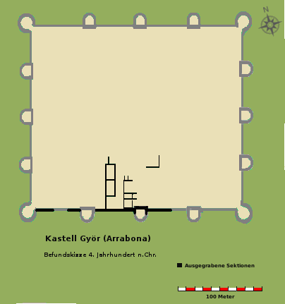 Befundskizze des spätantiken Kastell von Györ/Arrabona (HU), 4. Jahrhundert n.Chr.